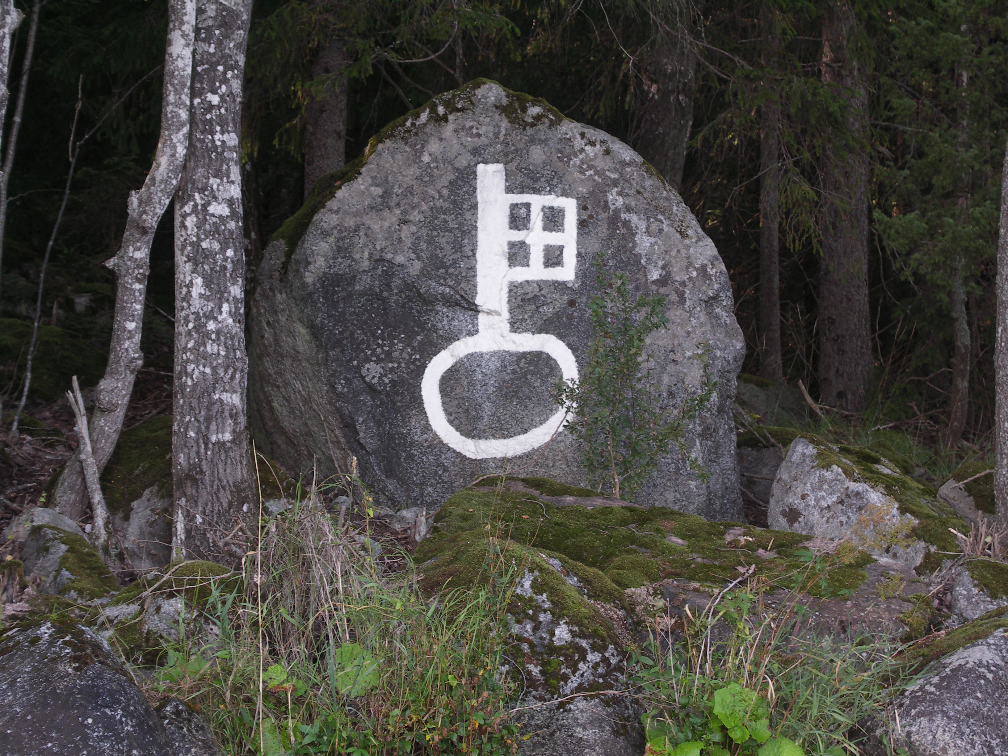 Sägnerna om Sigtuna Nyckelsten påstås härstamma från den tid då bl a ryska vikingar plundrade Sigtuna. De skulle då ha tagit med sig stadens bronsportar, men tappat nyckeln på en utpekad plats. På ett säreget format flyttblock vid stranden har minnet av händelsen hållits vid liv genom inhuggna och målade nycklar. Historikerna tvivlar på sanningshalten i sägnerna, men faktum är att Sigtunaporten - eller Svenskporten - är en sevärdhet i Novgorod. Där påstår man att porten, som nu sitter i Sofiakatedralen tagits som krigsbyte i Sigtuna år 1187. Källa: UKF